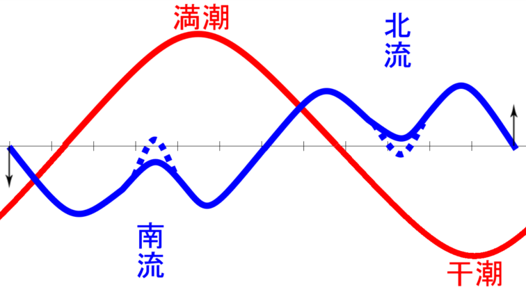 音戸の瀬戸 潮流と潮位の関係